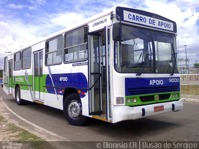 Busscar Urbanus da Viação Modelo